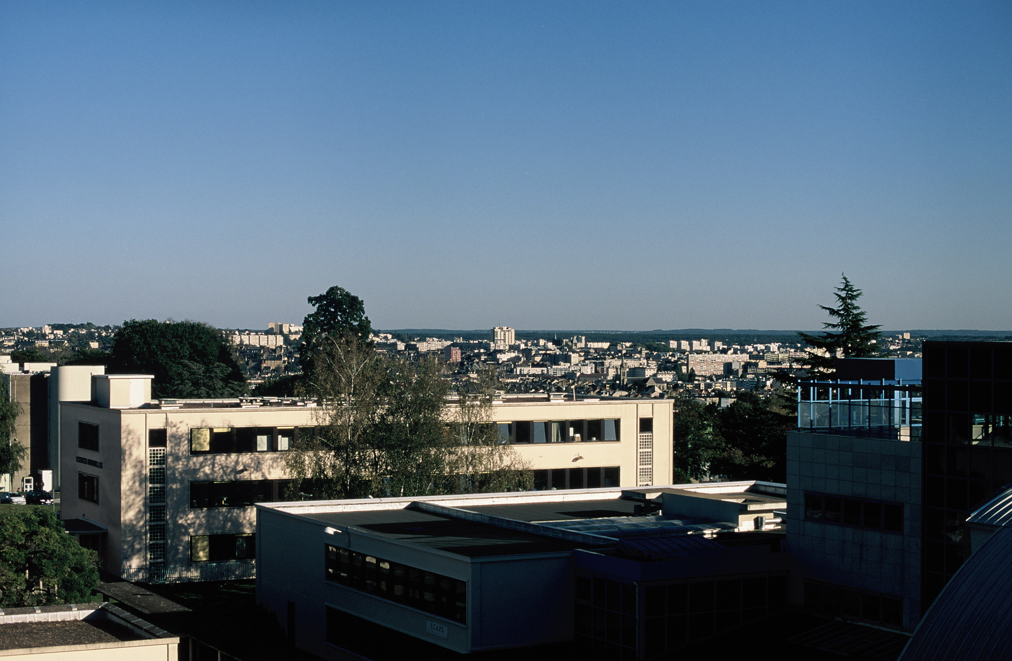 L'université du Maine sous un soleil radieux.